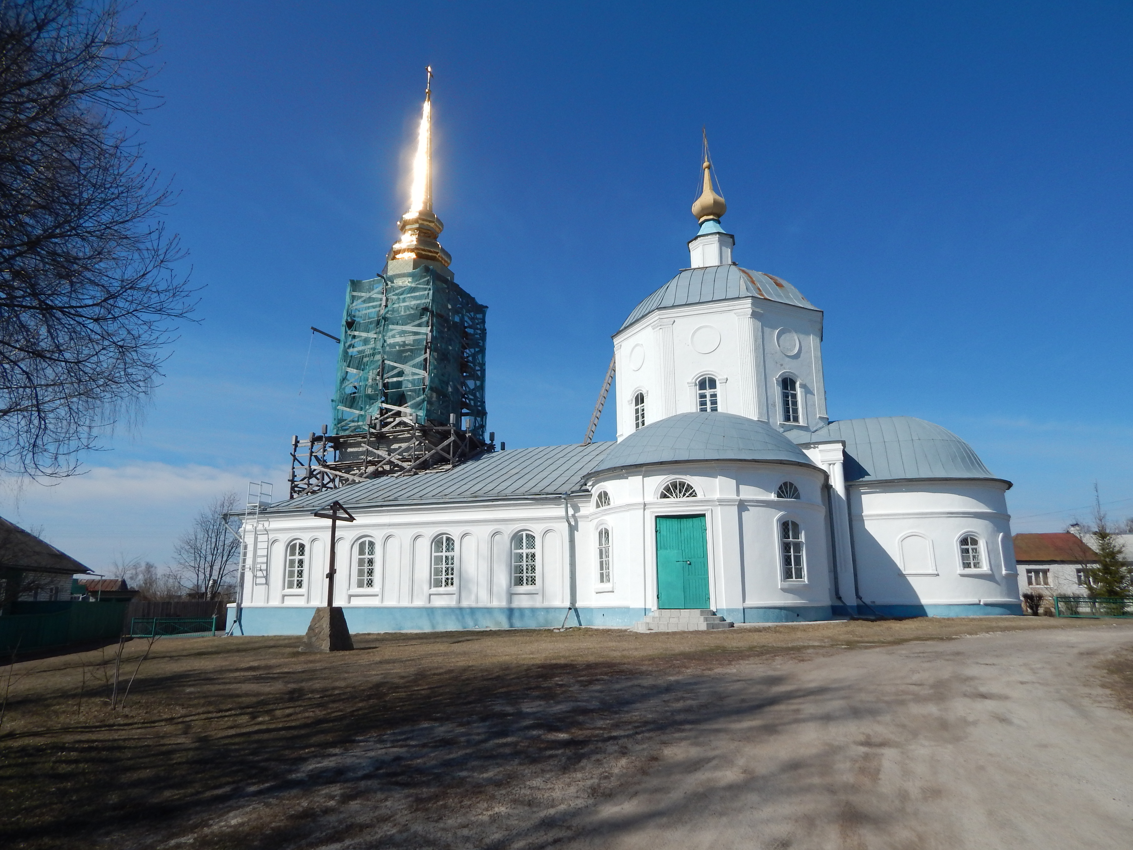 Karachev, Bryansk Oblast, Russia